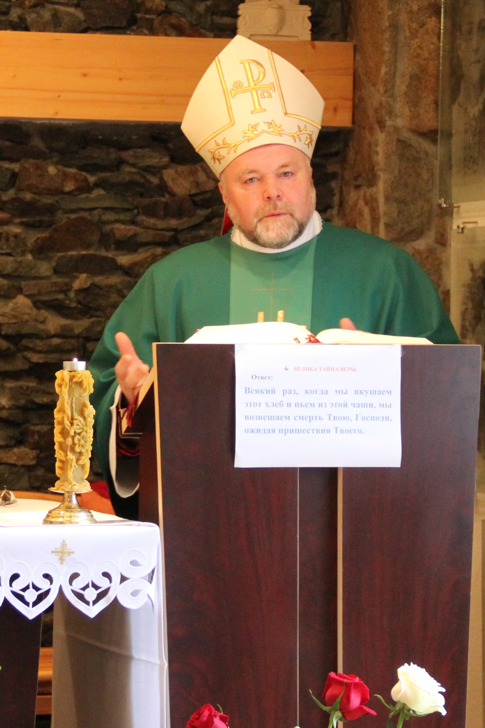 ks. bp Cyryl Klimowicz, biskup irkucki, w Parafii Św. Teresy od Dzieciątka Jezus Doktora Kościoła w Pietropawłowsku Kamczackim